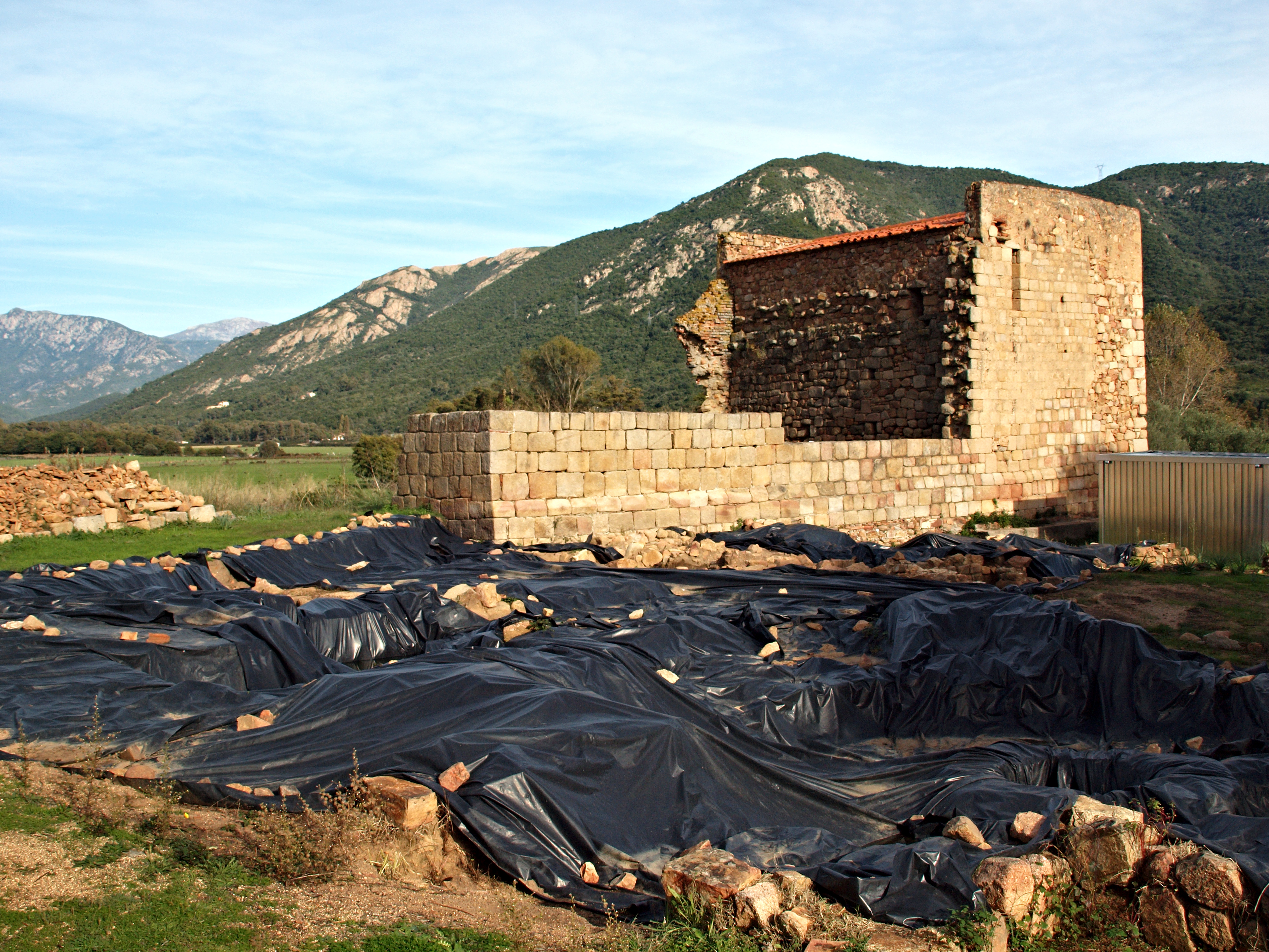 Vico, Ouest Corse (Corse) - Site archéologique de l'ancienne cathédrale Sant' Appiano à Sagone